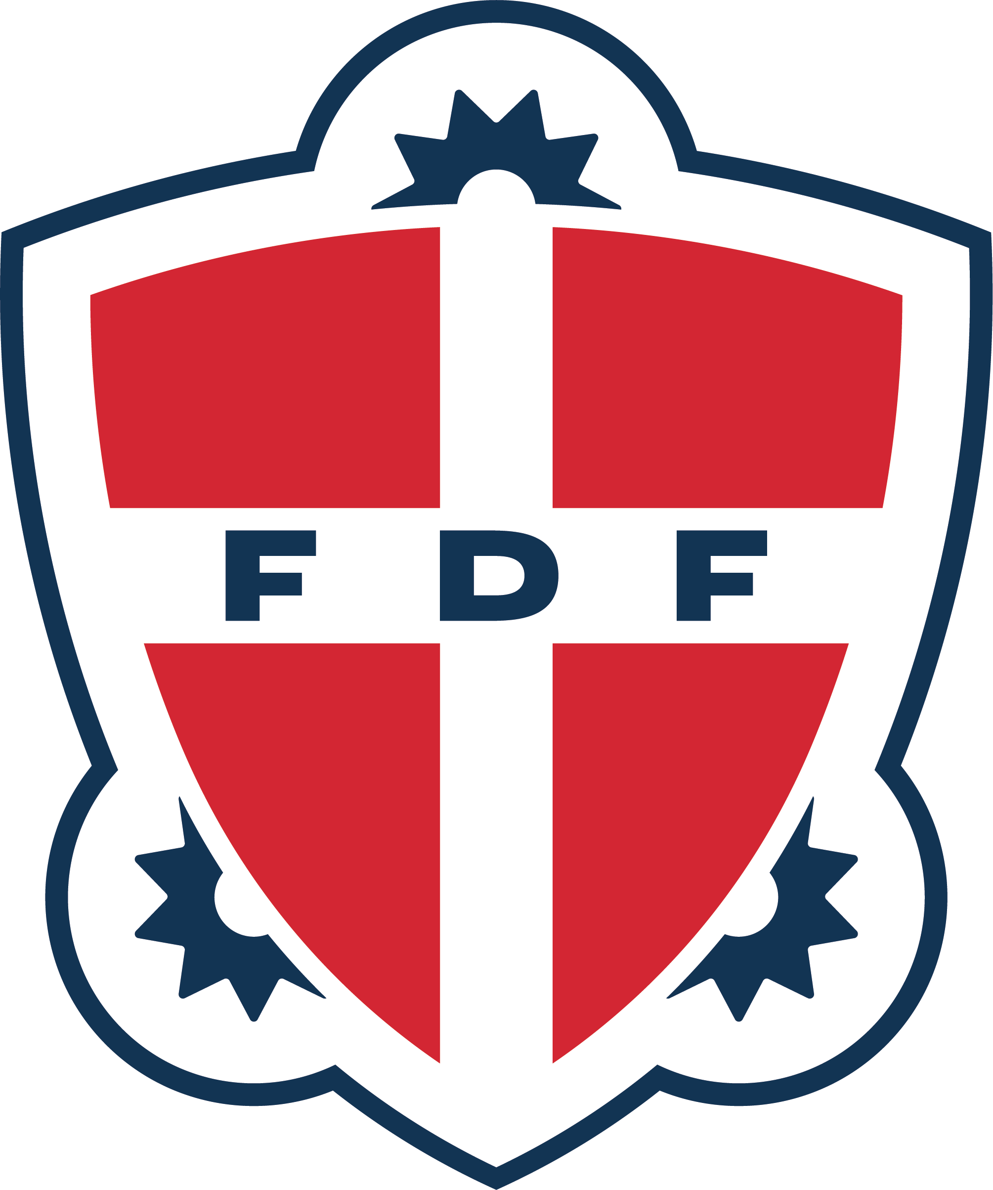 FDF skjold 2019